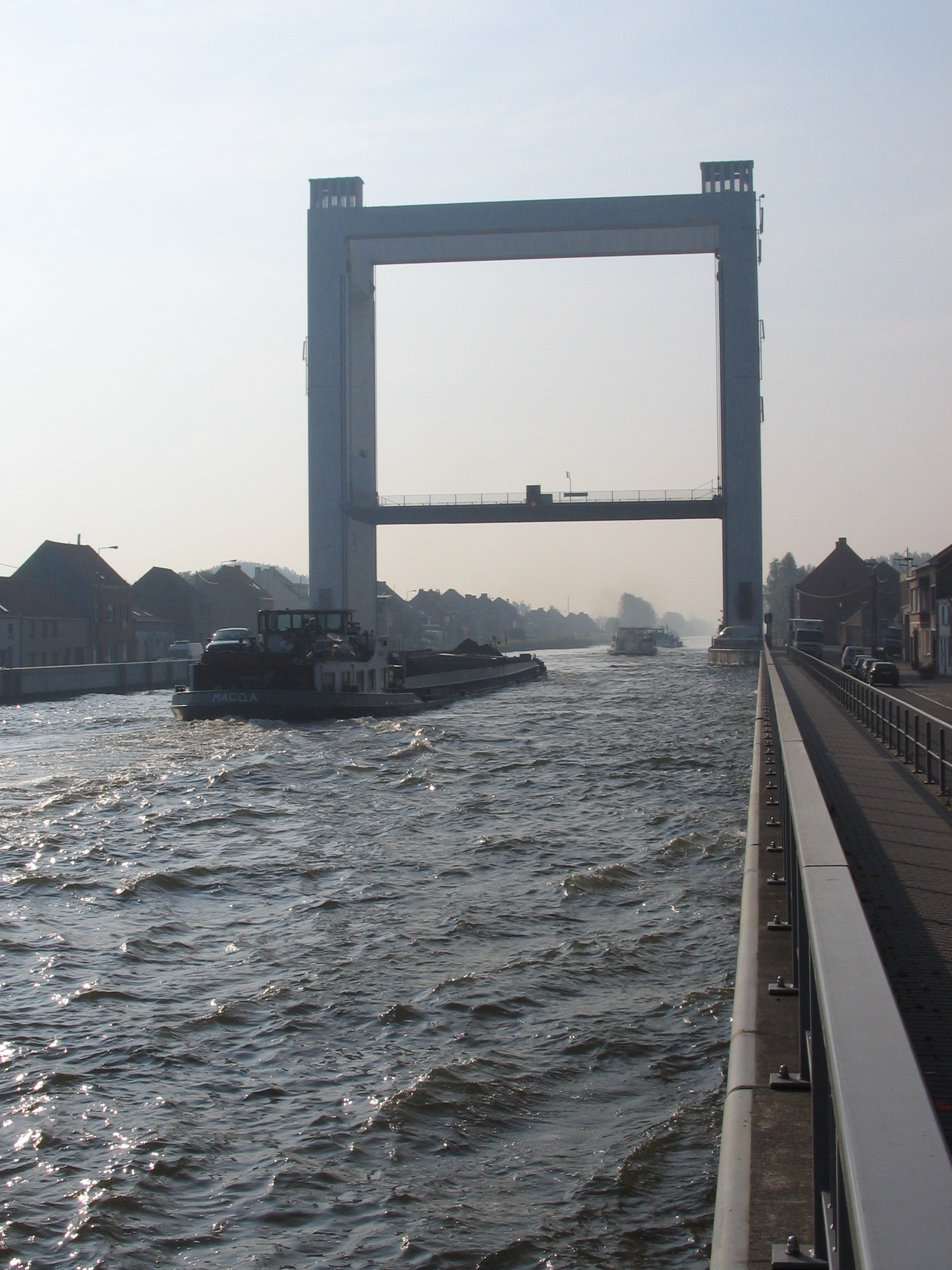 Kanaalbrug te Humbeek - eigen foto - september 2006